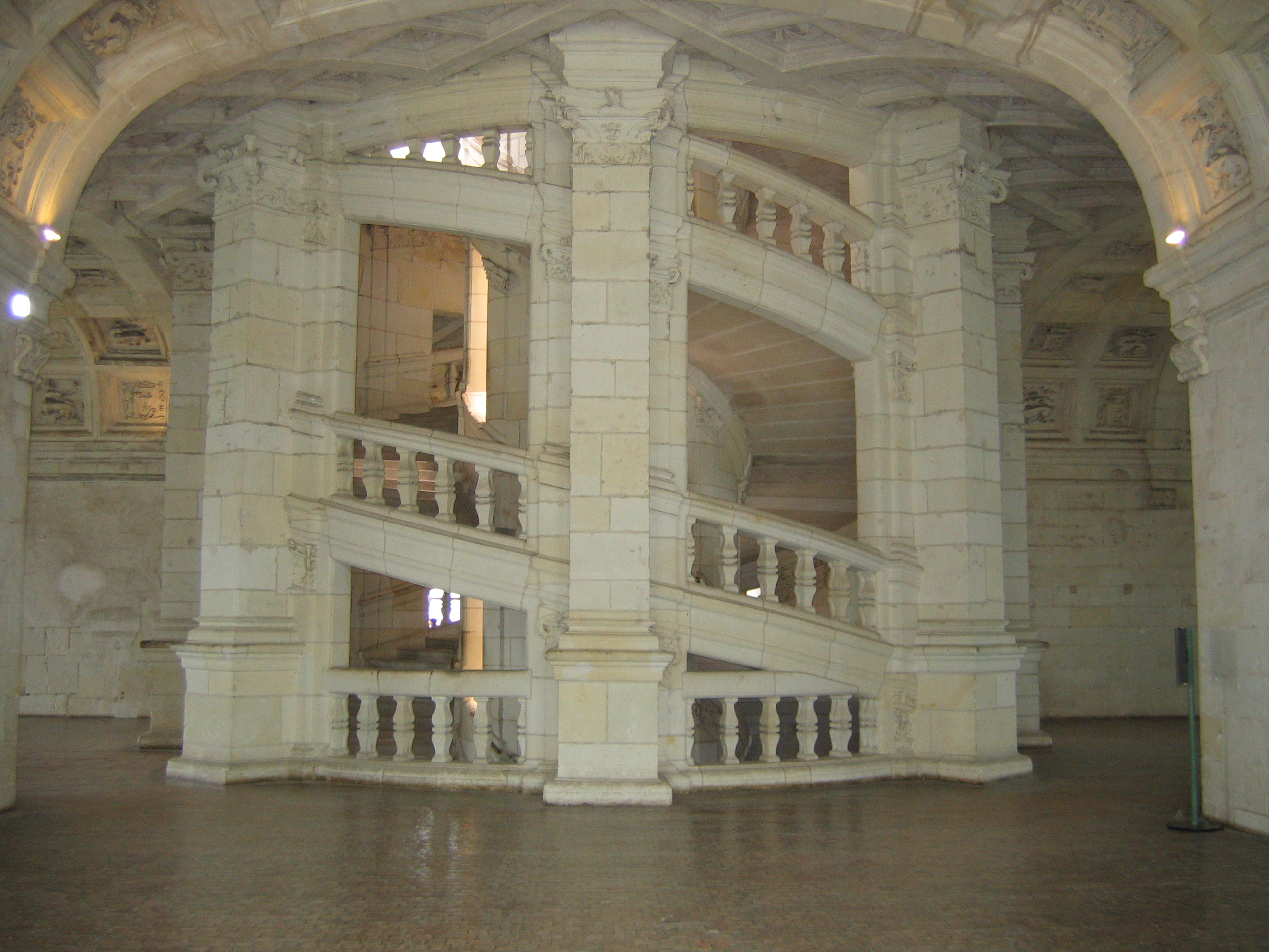 Escalier à double révolution (ou double hélice ou double colimaçon) du château de Chambord.